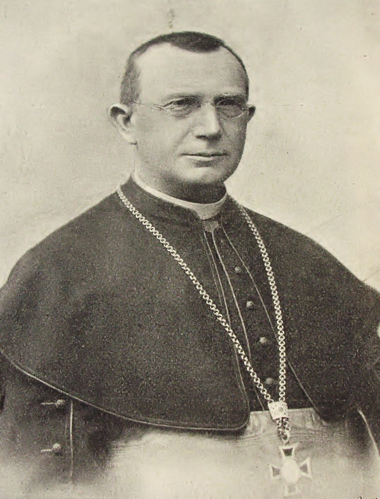 Portrét Josef Antonín Hůlka